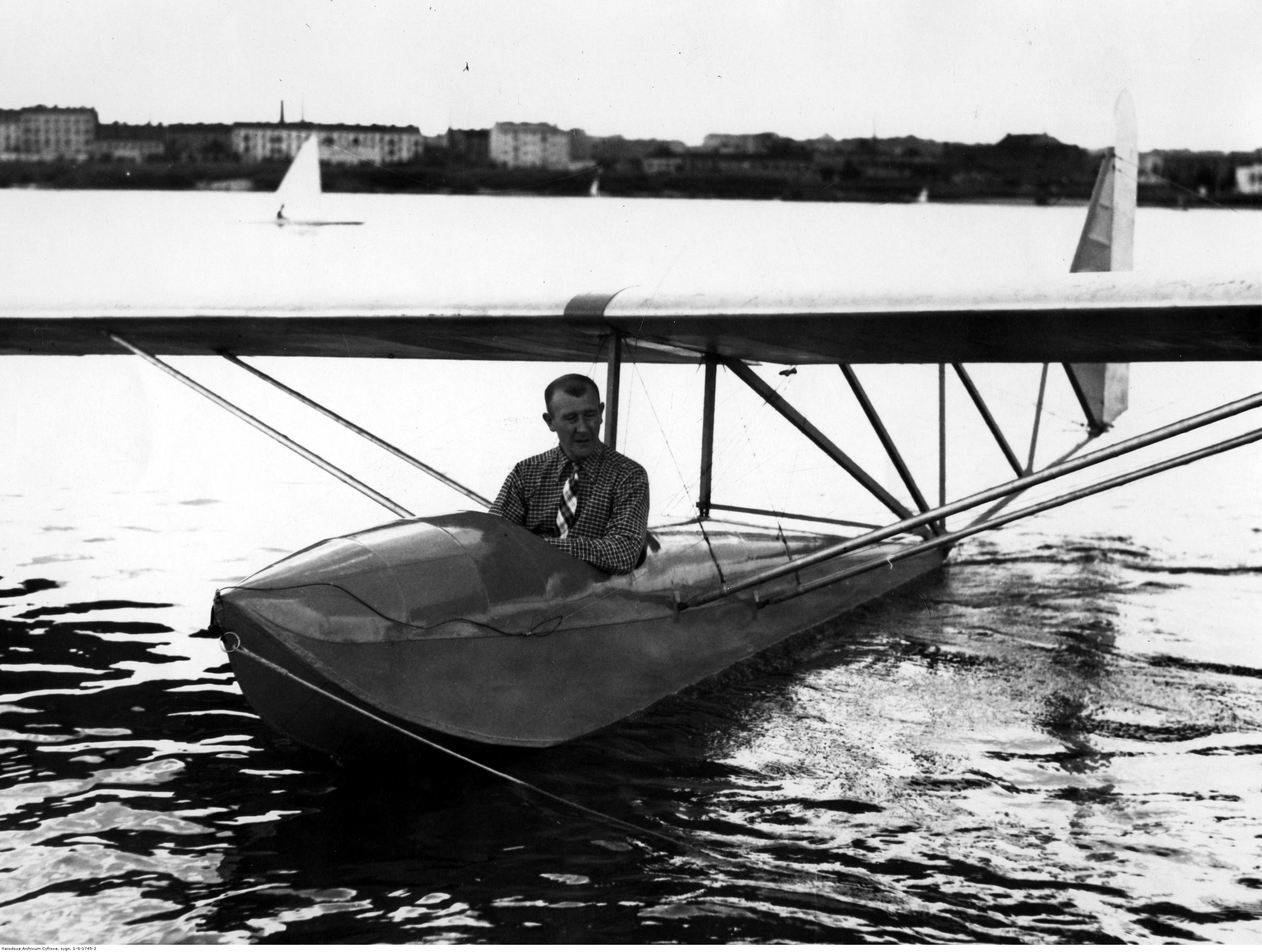 Wodnoszybowiec MT-1 podczas testów na Wiśle